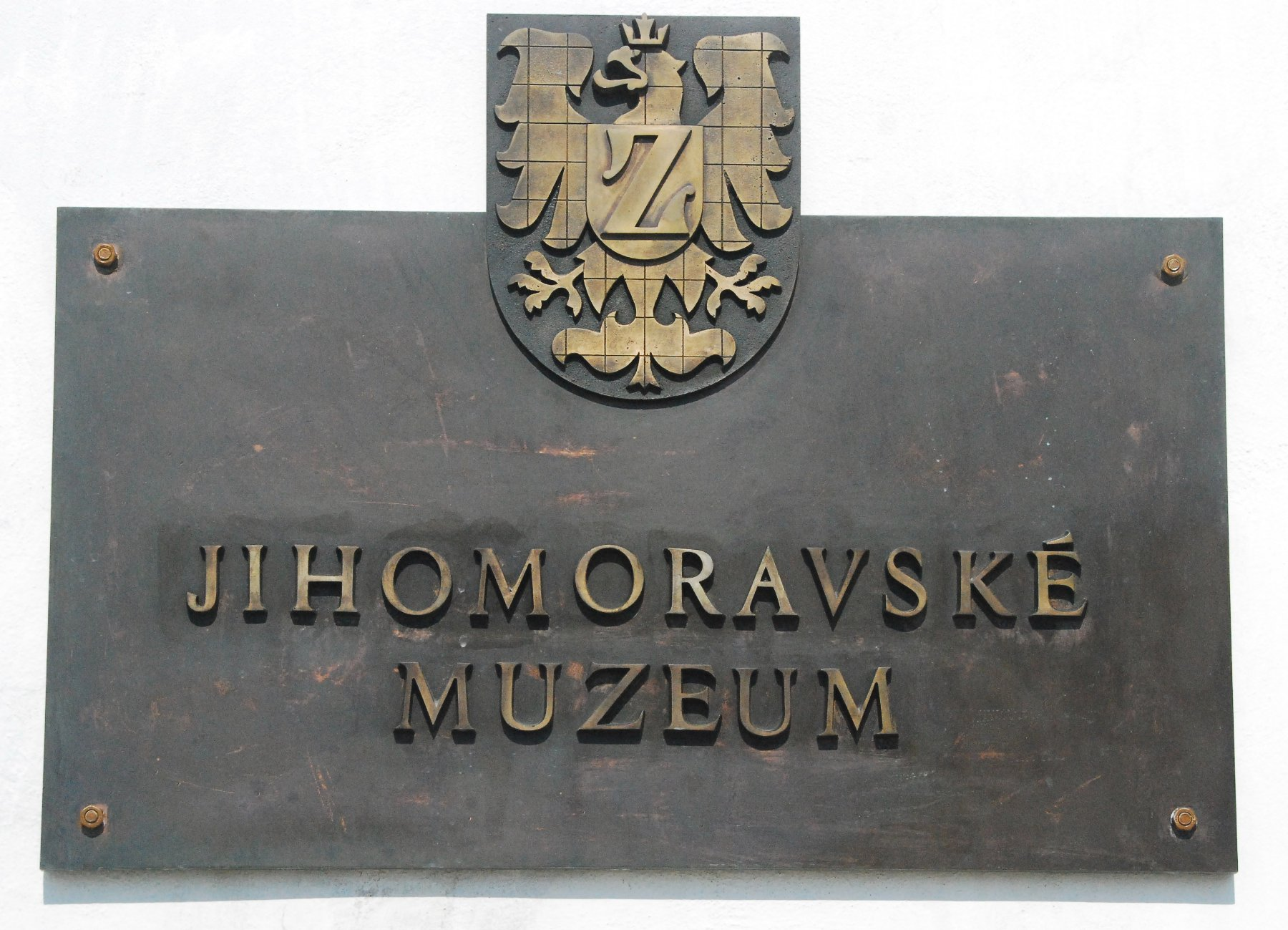 Südmährisches Museum in Znaim